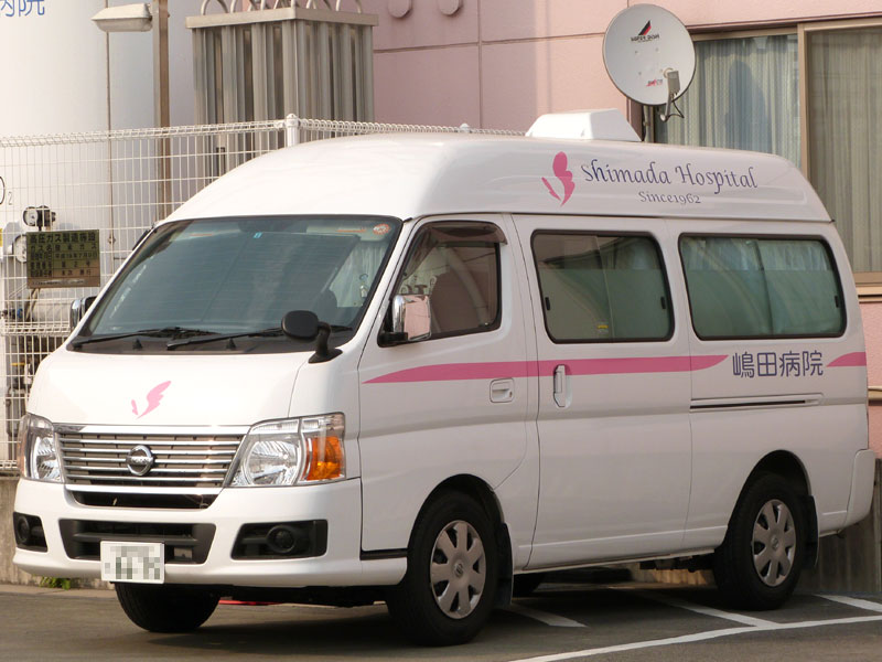 病院の患者搬送車。車内は２B型とほぼ同じ。